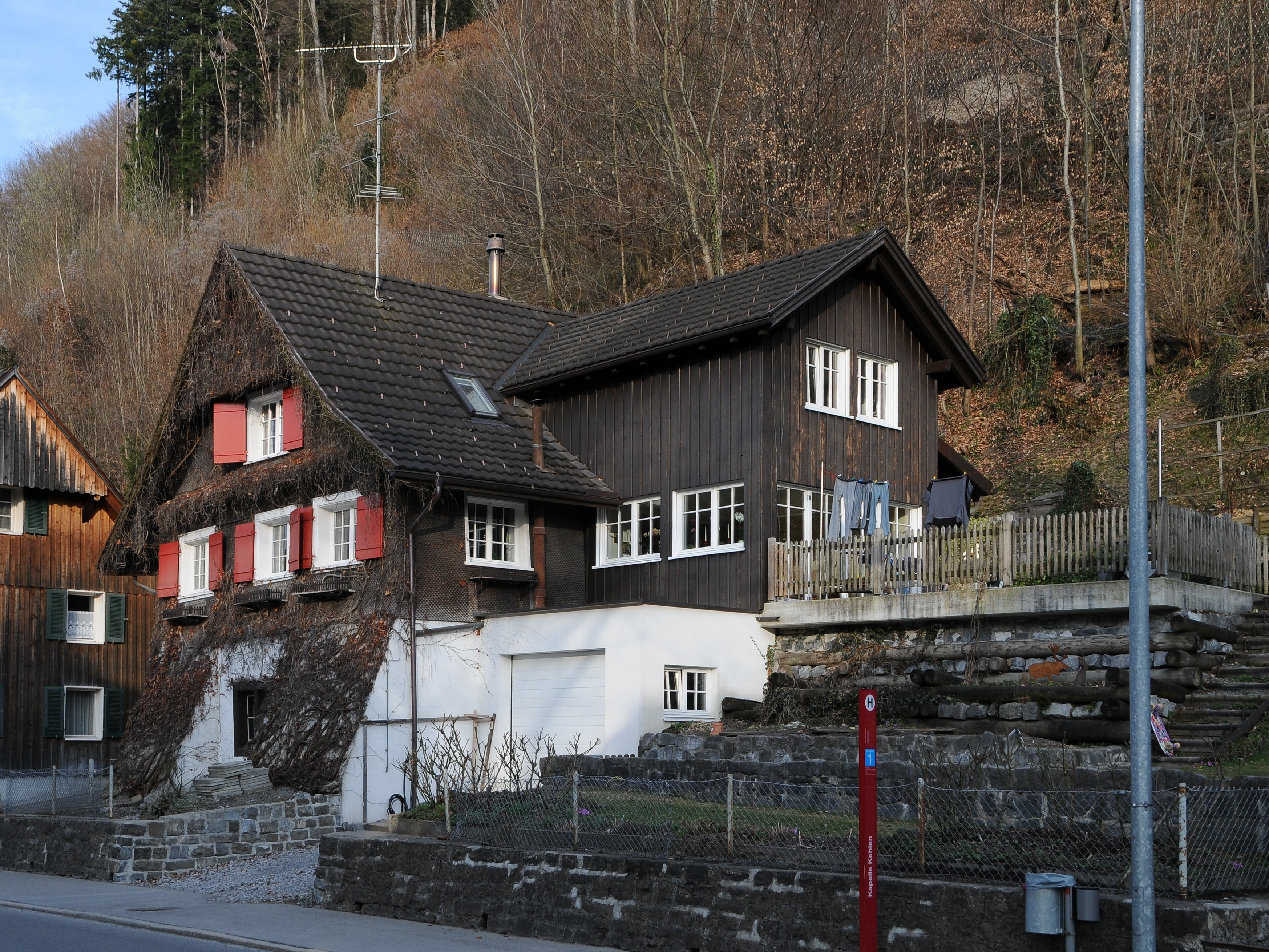 aus dem DEHIO Vorarlberg 1983: Kehlerstraße Nr.52 in Kehlen (Haselstauden). Rheintalhaus, im Kern 17. Jh., auf hohem Kellersockel eingeschossiger verschindelter Blockbau mit verschaltem Giebeldreieck und Klebdach an der Stirnseite.